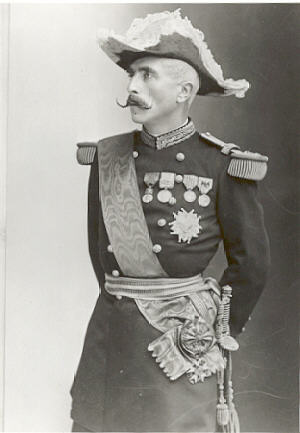 Marquis de Galliffet, photo by Nadar.